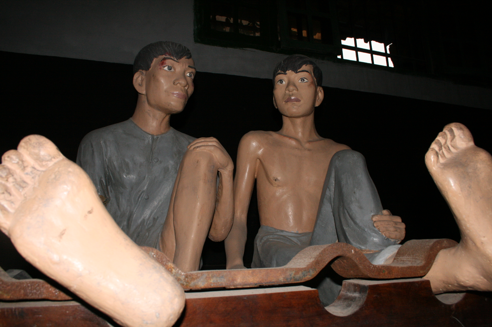 Phục dựng cảnh tù nhân Hỏa Lò.